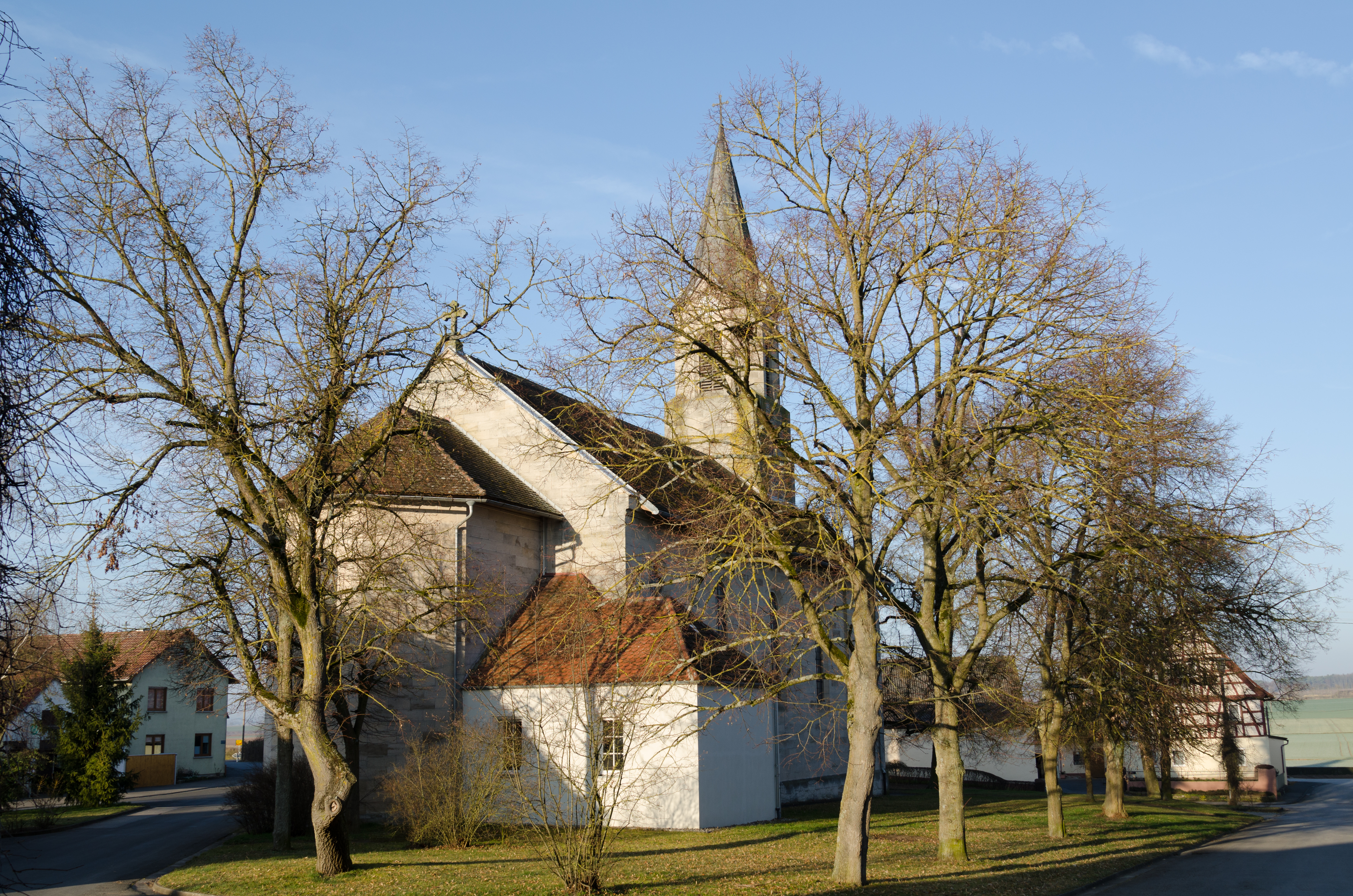 Katholische Fiilialkirche St. Lorenz in Ottelmannshausen